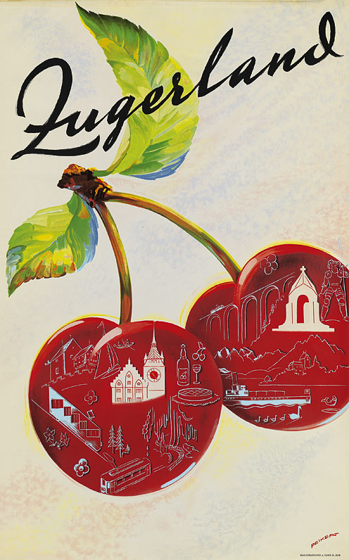 Plakat «Zugerland», 1939 gestaltet vom Zuger Grafiker Martin Peikert.